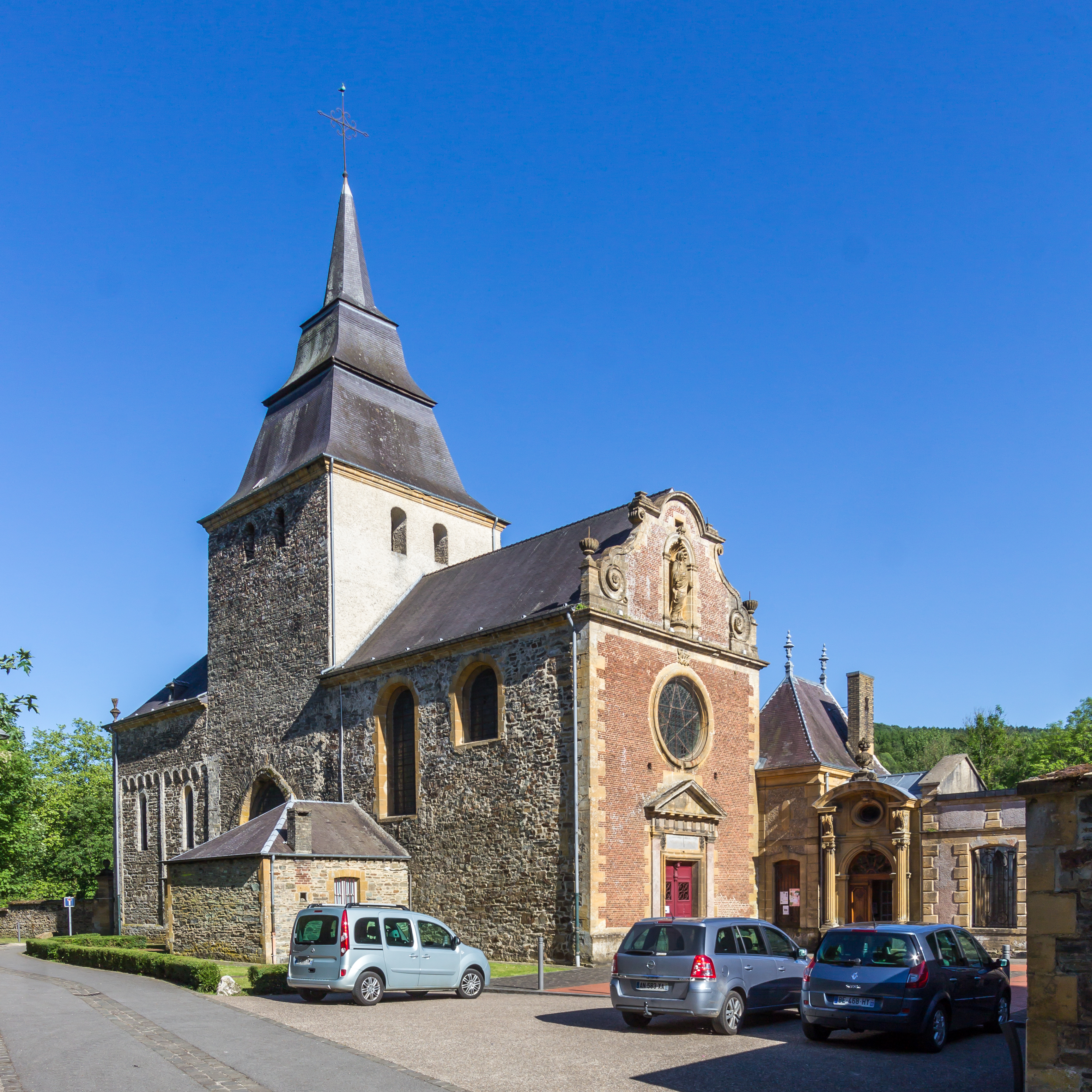 Abbaye de Laval Dieu, Monthermé .